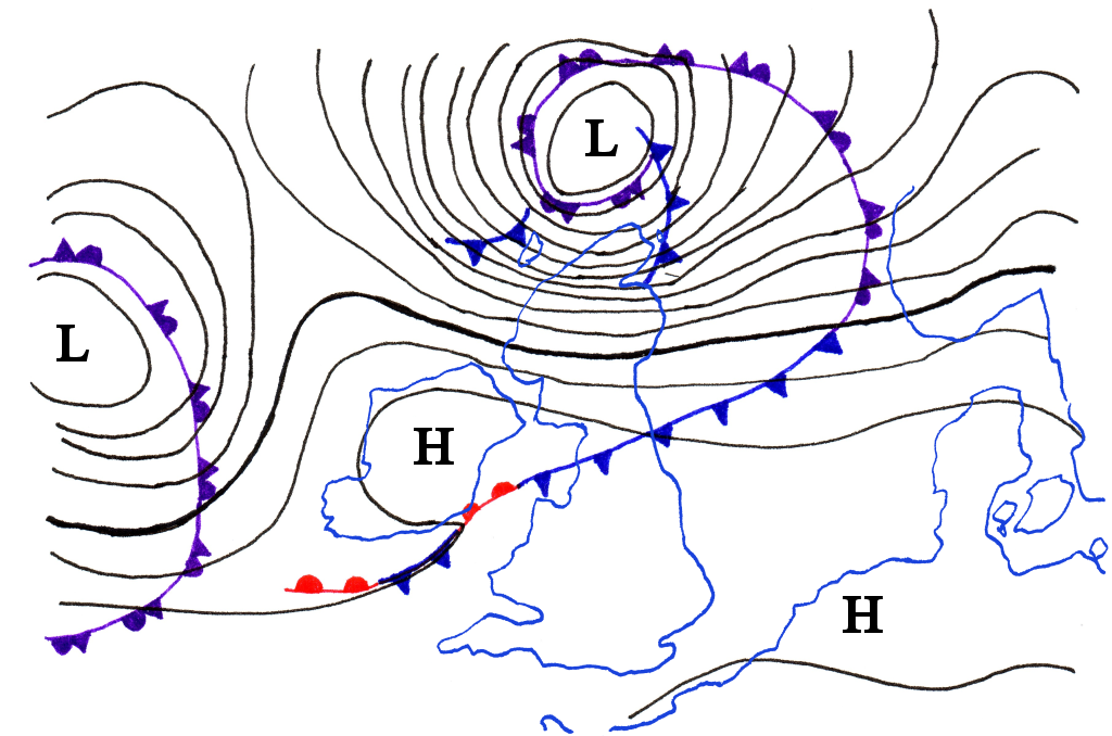 Isobaren